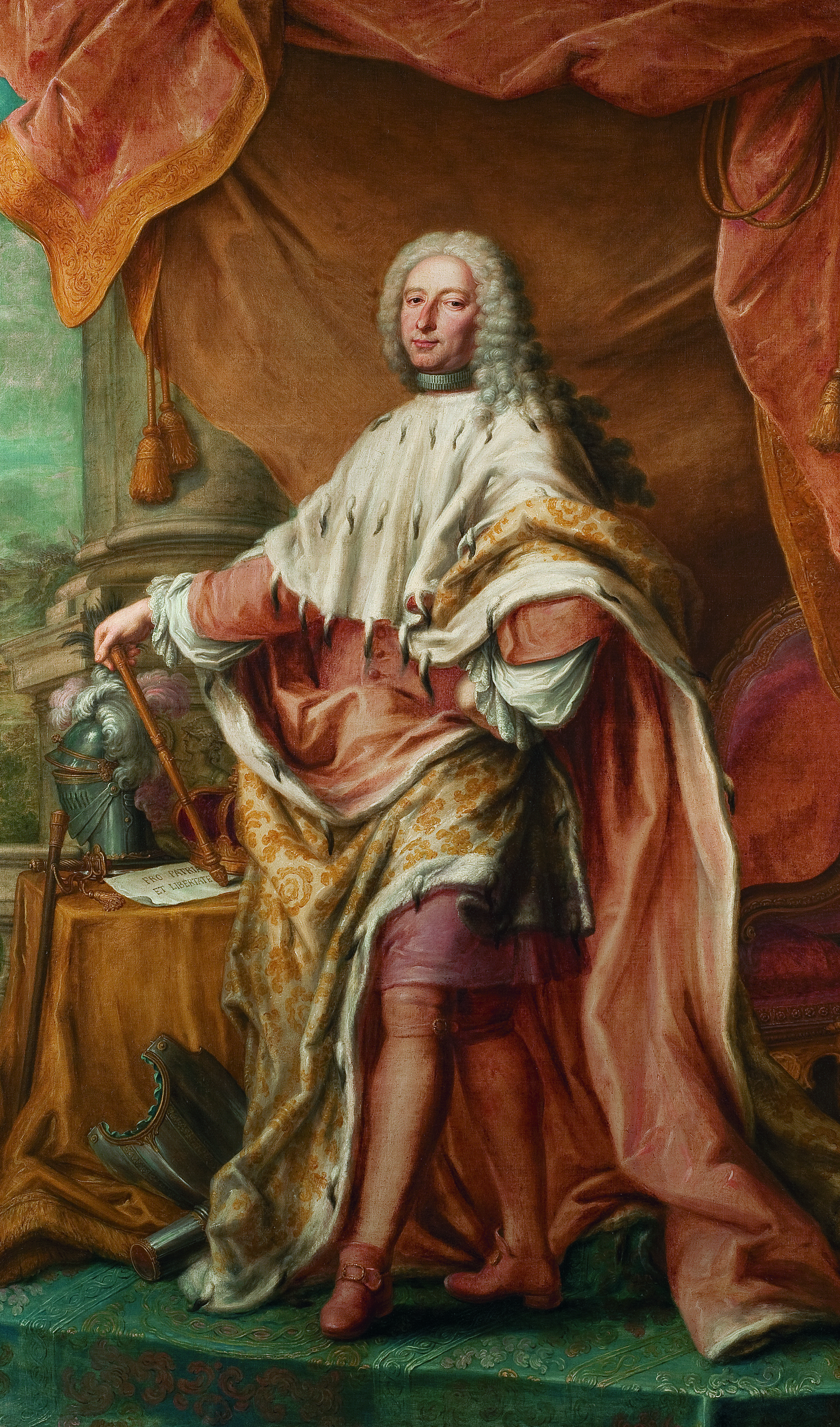 Il doge Giovanni Francesco Brignole Sale (1695-1760)